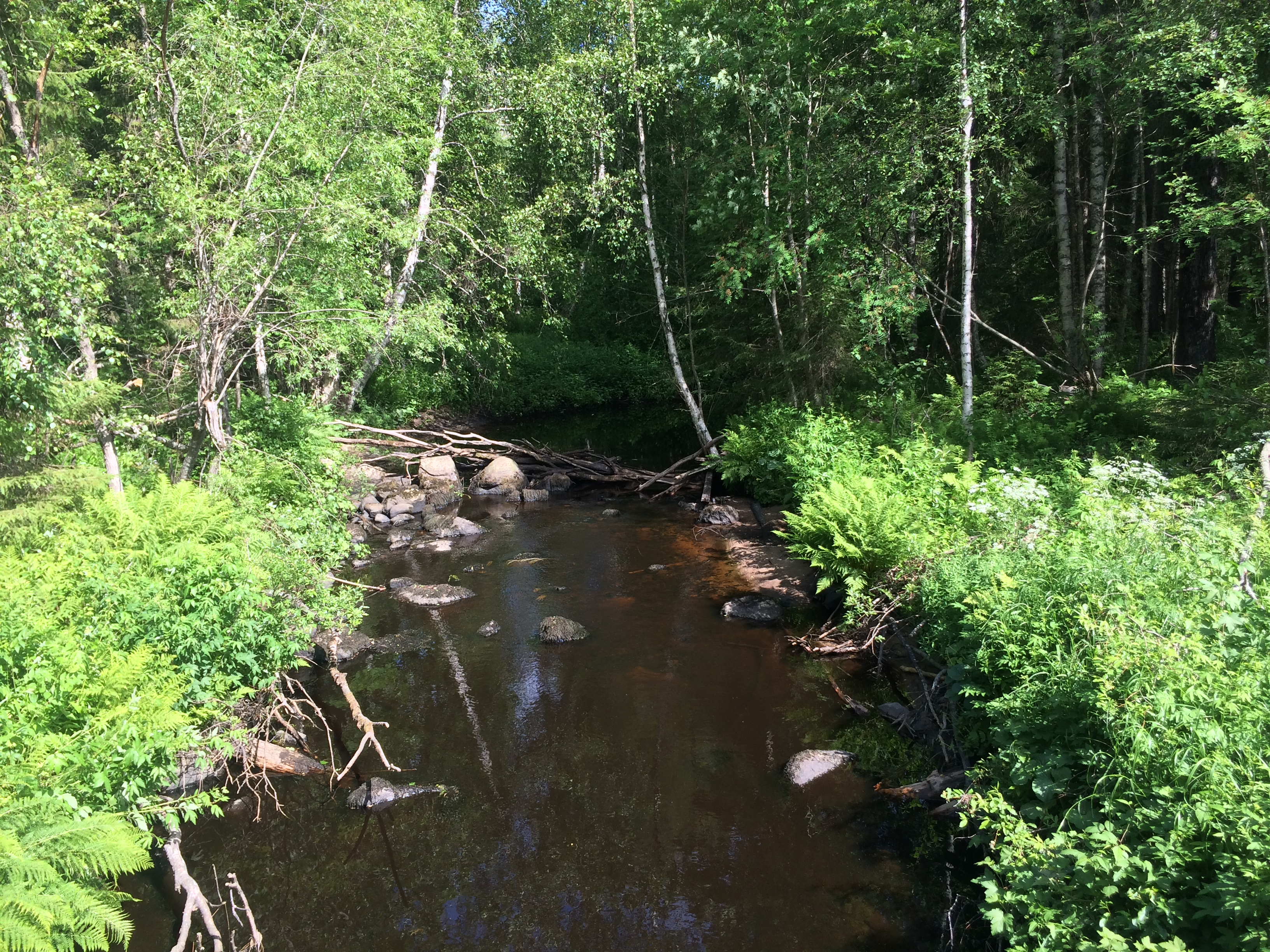 Саморека (река)